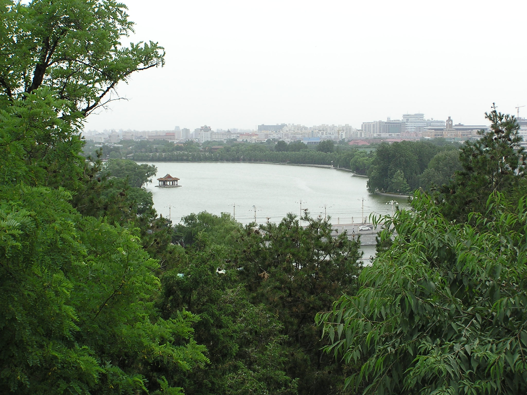 Blick auf Zhongnanhai (abgeschlossener Regierungsbezirk in Peking) - View at Zhongnanhai (government district in Beijing)